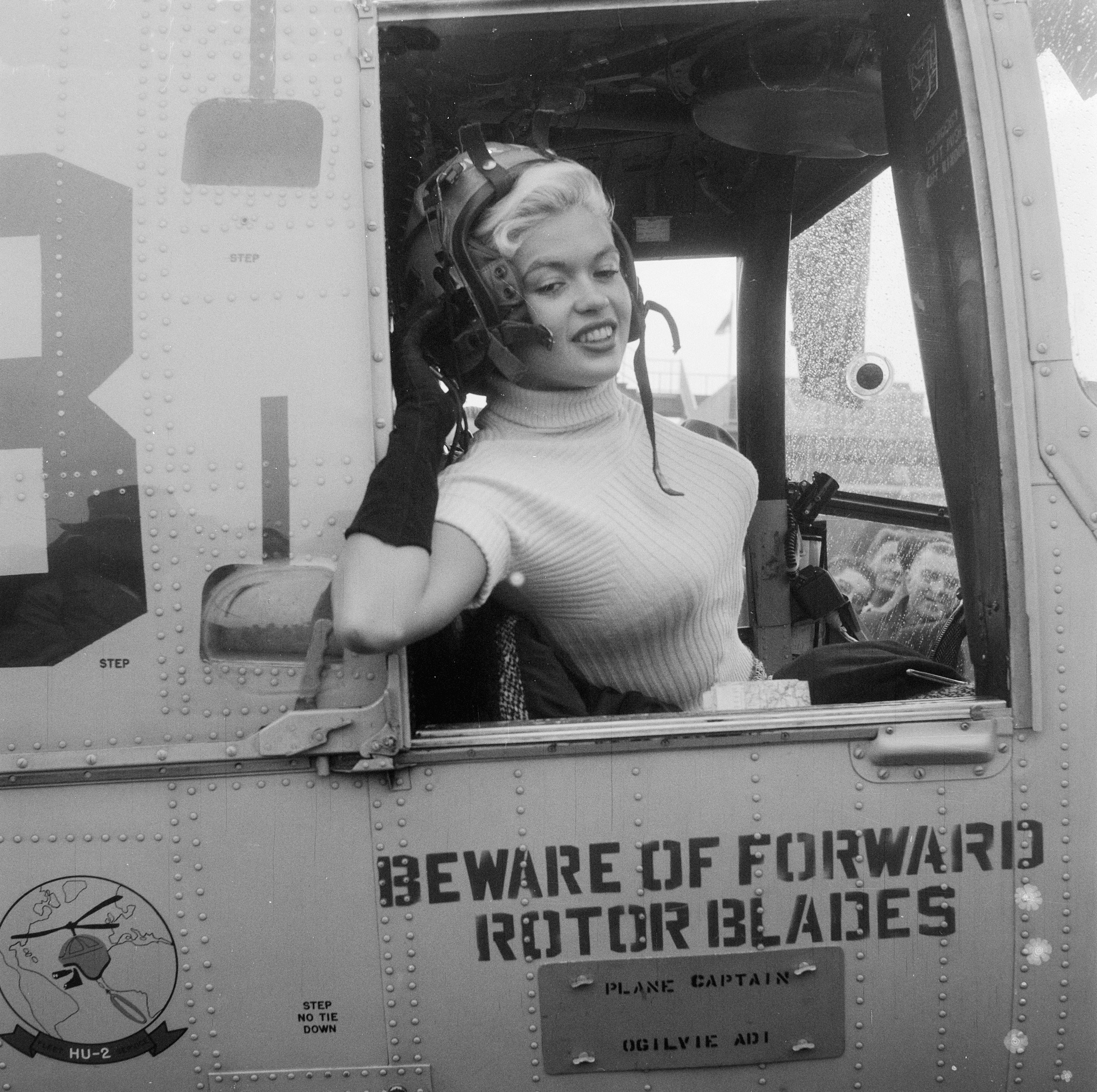 Collectie / Archief : Fotocollectie Anefo Reportage / Serie : [ onbekend ] Beschrijving : Jayne Mansfield vertrekt per helicopter naar Rotterdam Datum : 11 oktober 1957 Trefwoorden : actrices, filmsterren, helicopters Persoonsnaam : Mansfield, Jayne Fotograaf : Noske, J.D. / Anefo Auteursrechthebbende : Nationaal Archief Materiaalsoort : Negatief (zwart/wit) Nummer archiefinventaris : bekijk toegang 2.24.01.03 Bestanddeelnummer : 909-0253